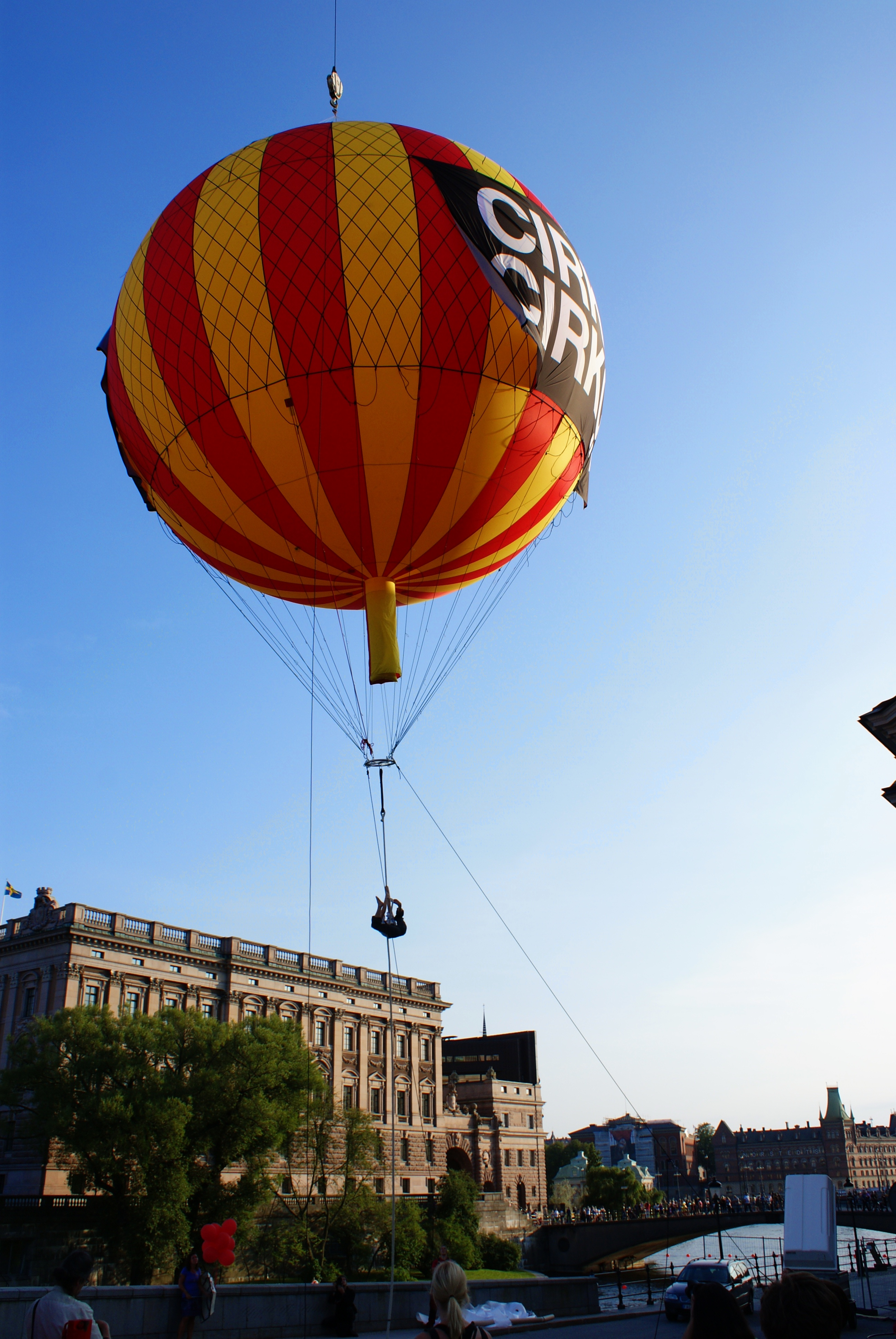 Cirkus Cirkör på Stockholms Kulturfestival 2010